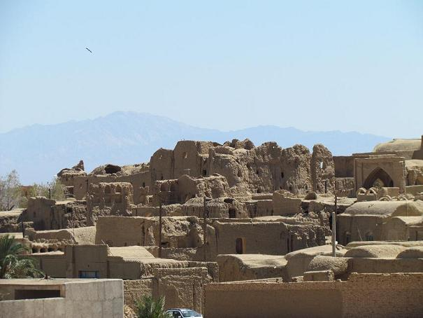 نمای بافت قدیمی از خشت و گل و دور نما قله باستانی مربوط به دوره ساسانیان